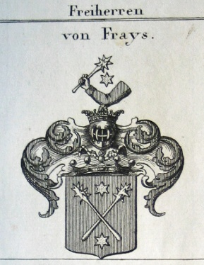 Wappen der Freiherrn von Frays (Bayerischer Adelsstand, 1817